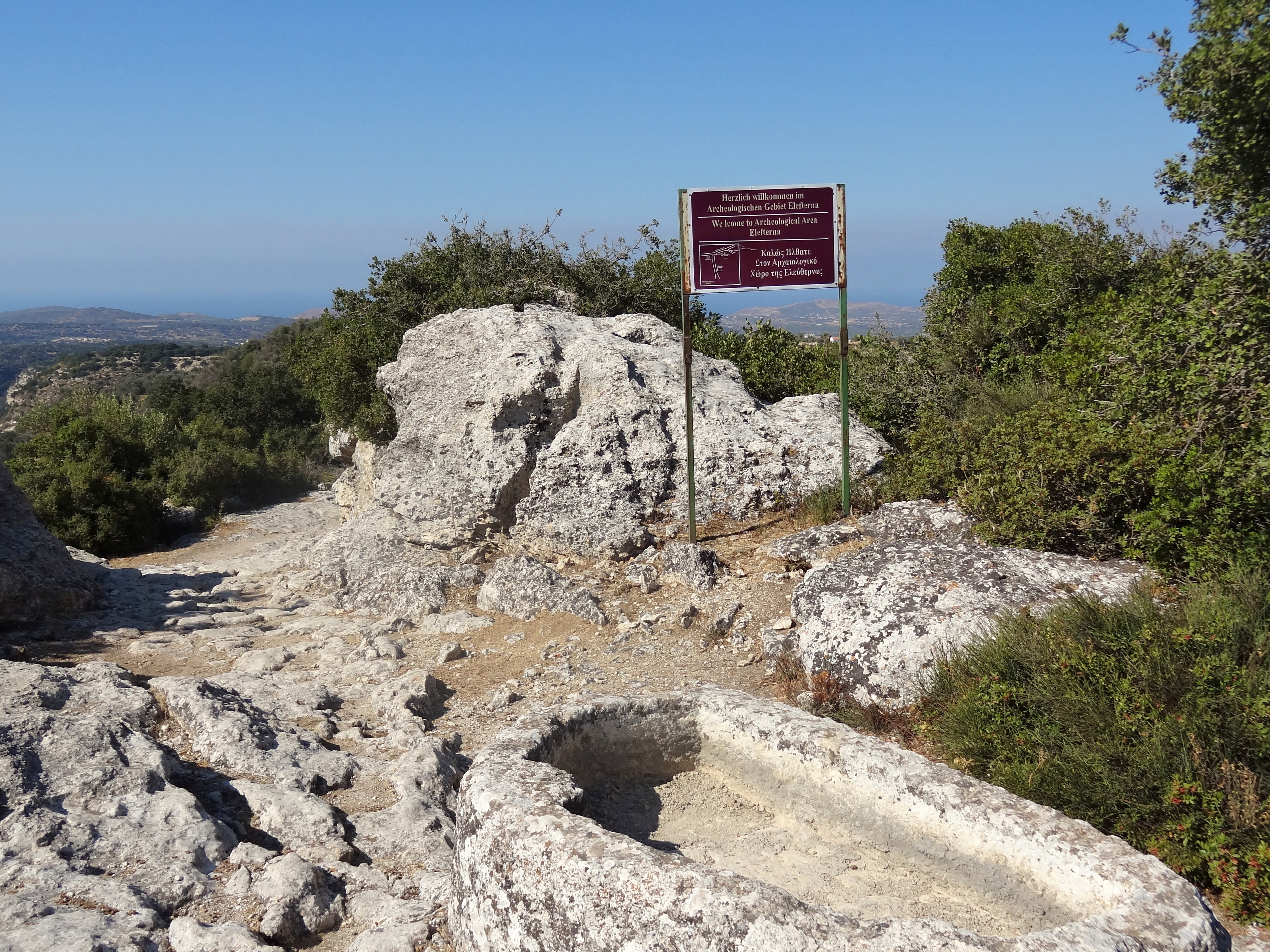 Akropolis von Eleutherna (Ἐλευθέρνα), Gemeinde Rethymno, Regionalbezirk Rethymno, Kreta, Griechenland